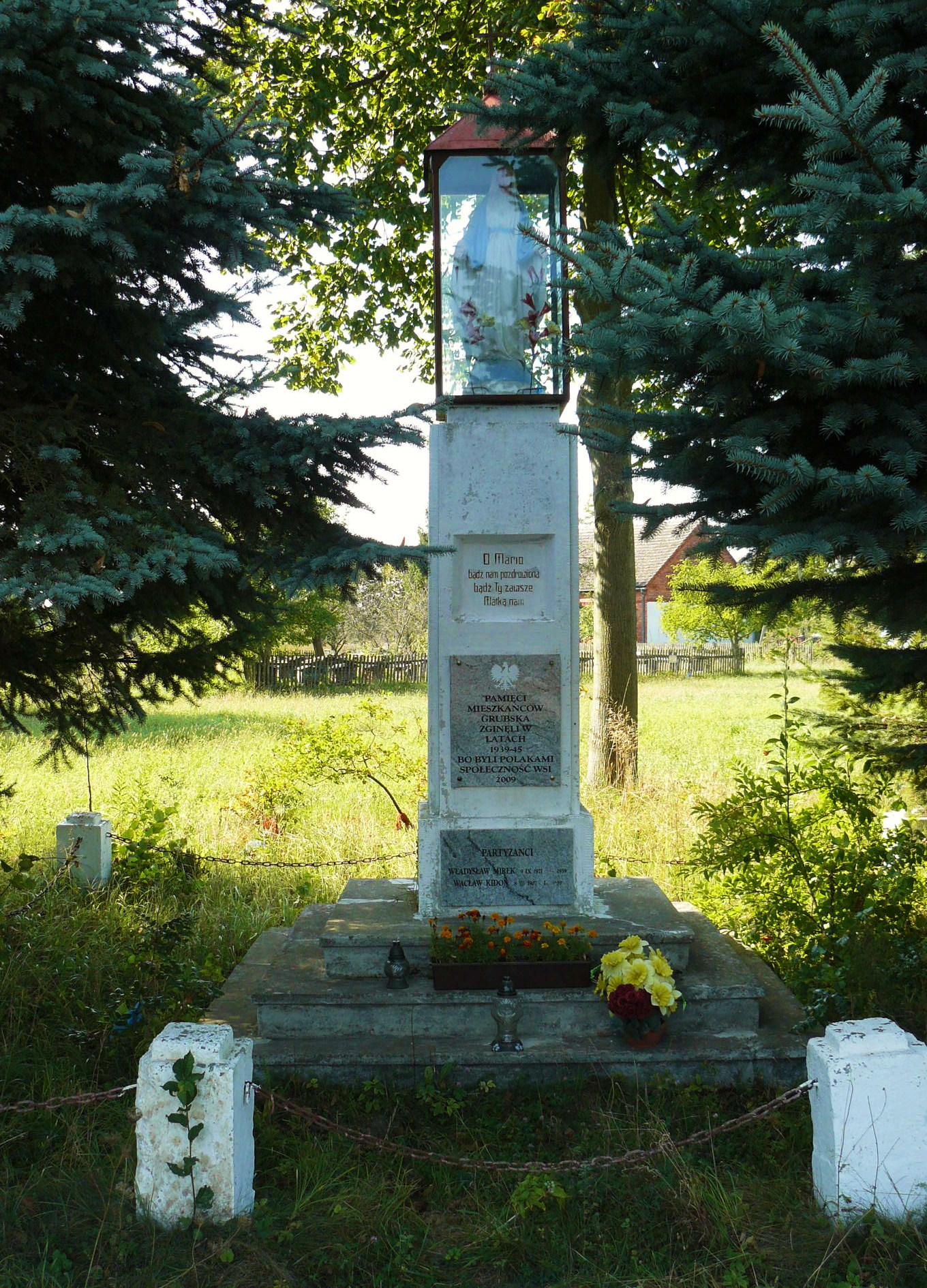 Pomnik ofiar faszyzmu i partyzantów polskich w Grubsku.